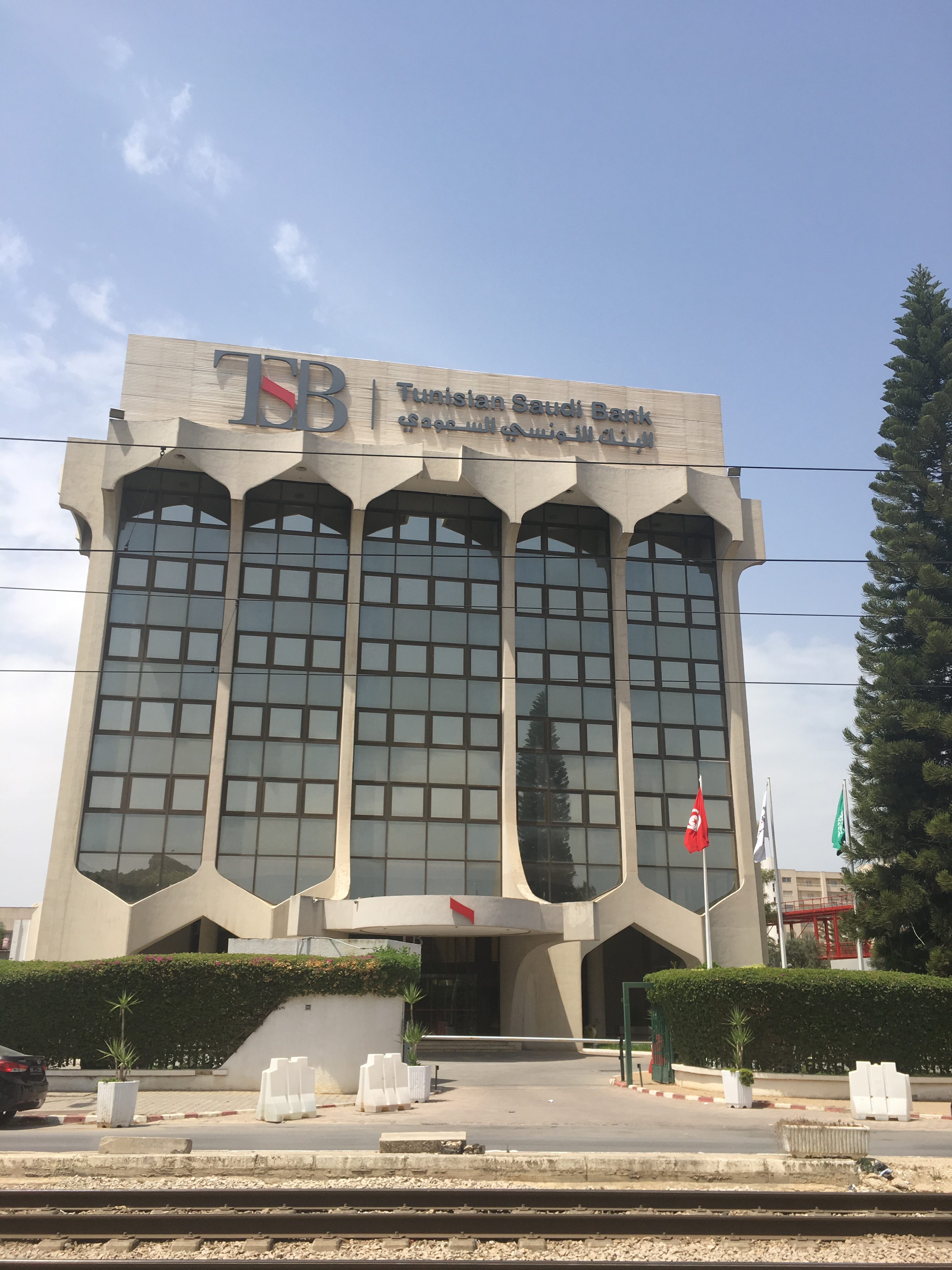 Siège de la Tunisian Saudi Bank (TSB), Centre Urbain Nord, Tunis, 2019.